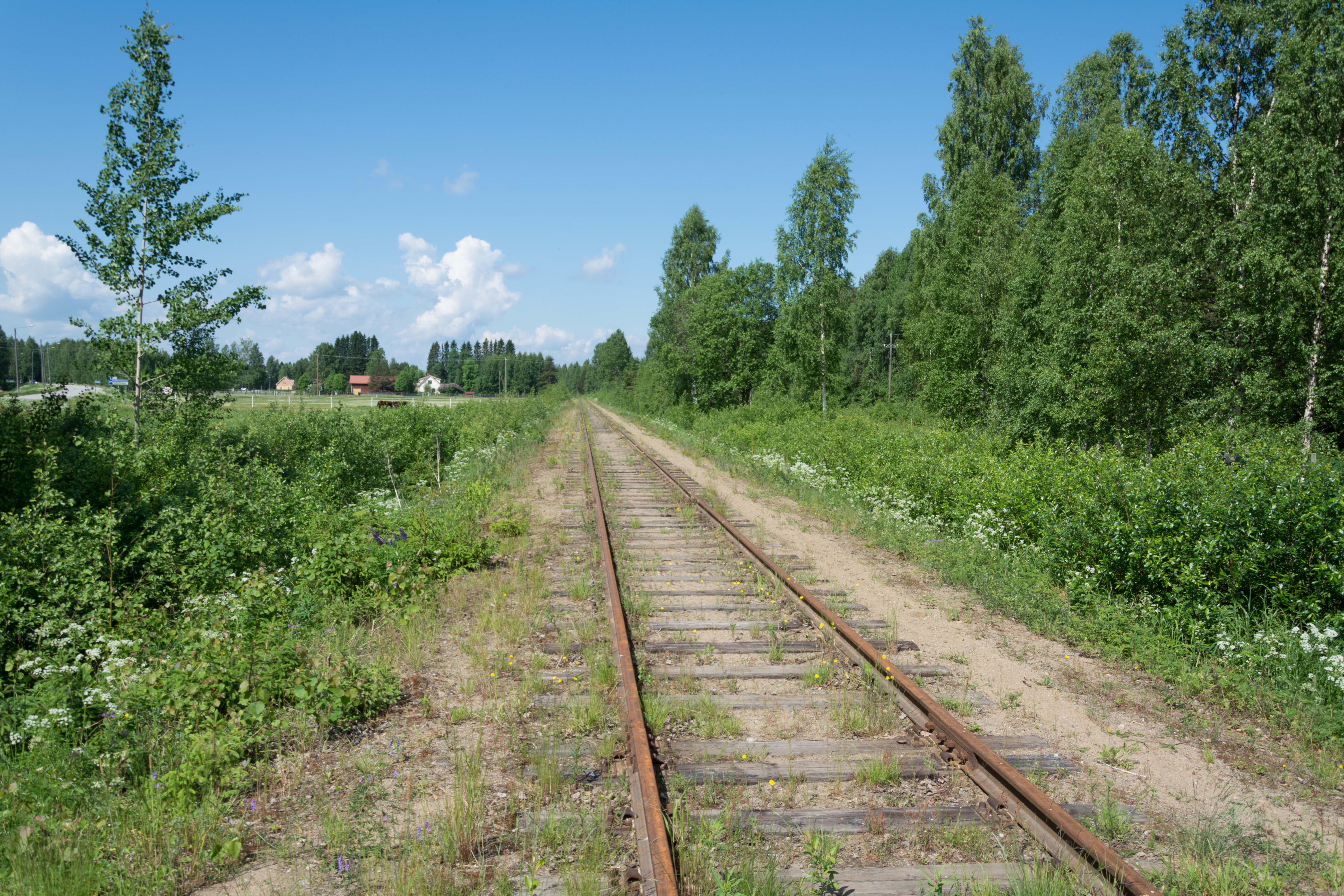 Iisveden rataa kuvattuna tasoristeyksestä